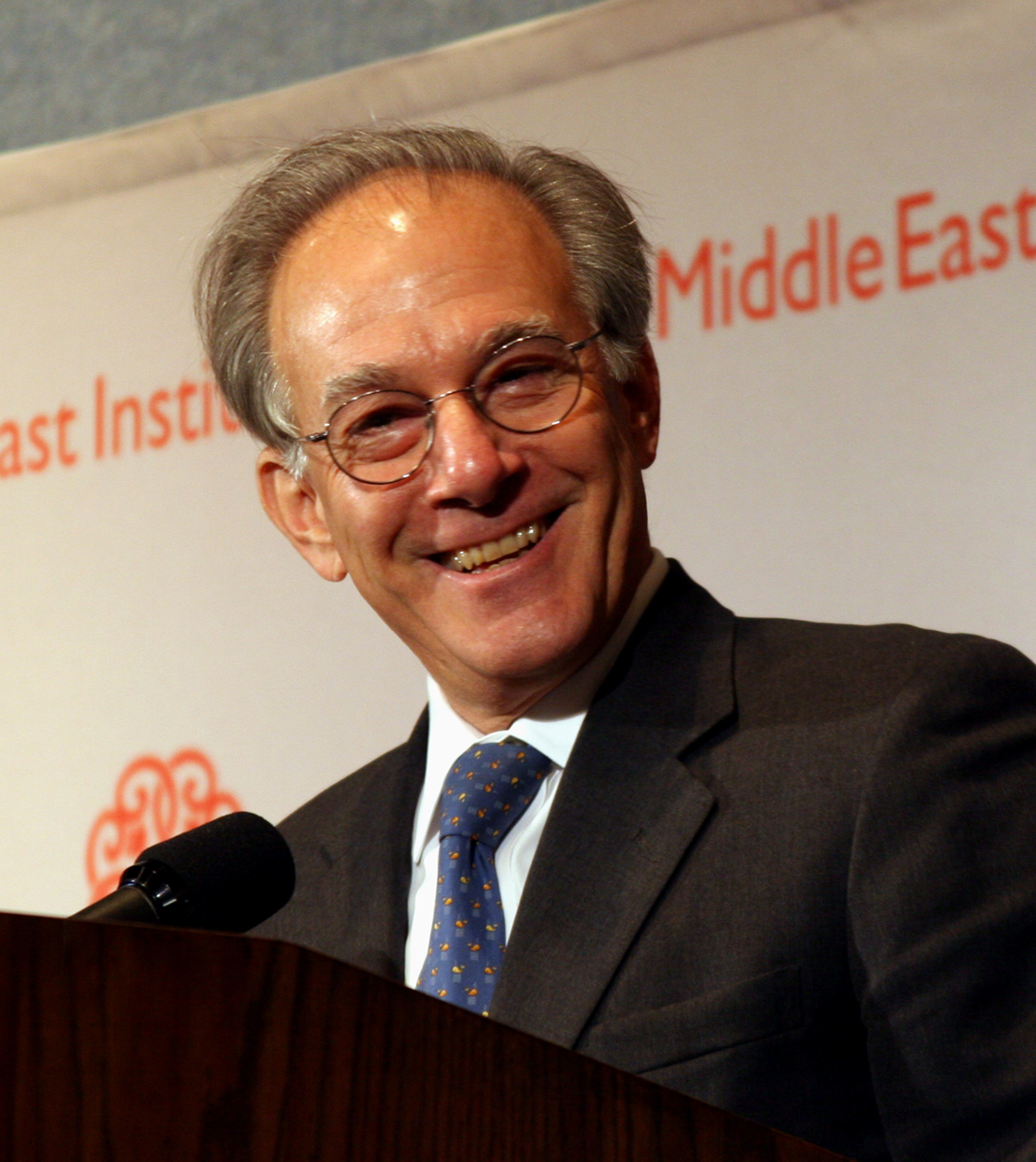 David Ignatius